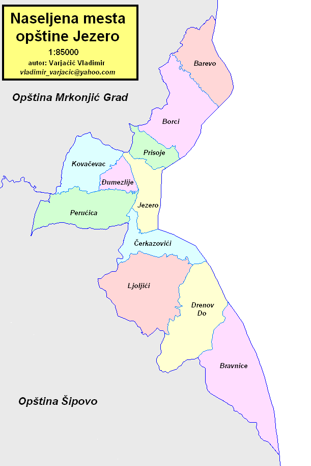 Opština Jezero